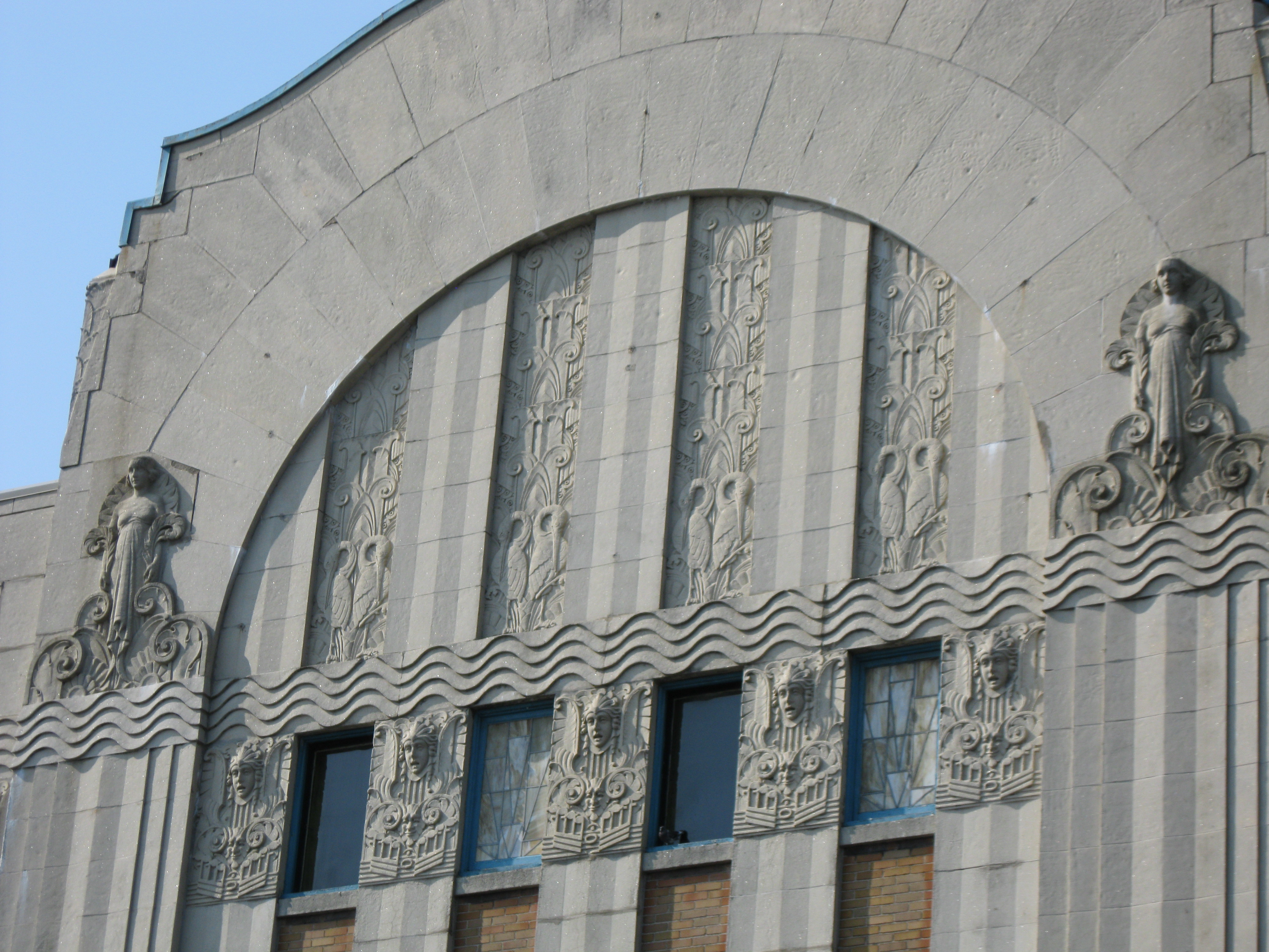 Cinéma Le Château, 6950, rue Saint-Denis, Montréal